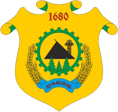 Герб Кремінної